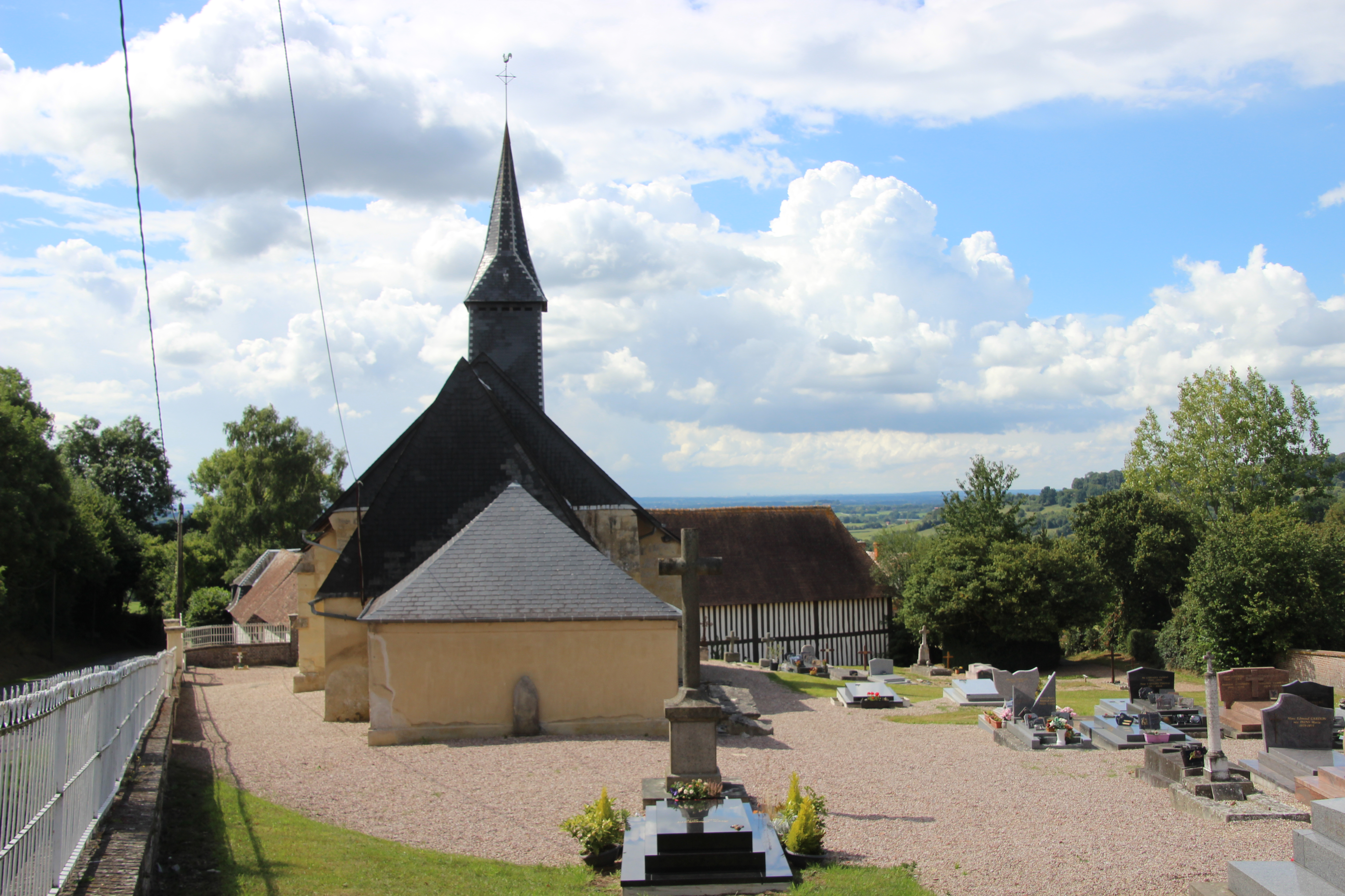 église lessard et le chene